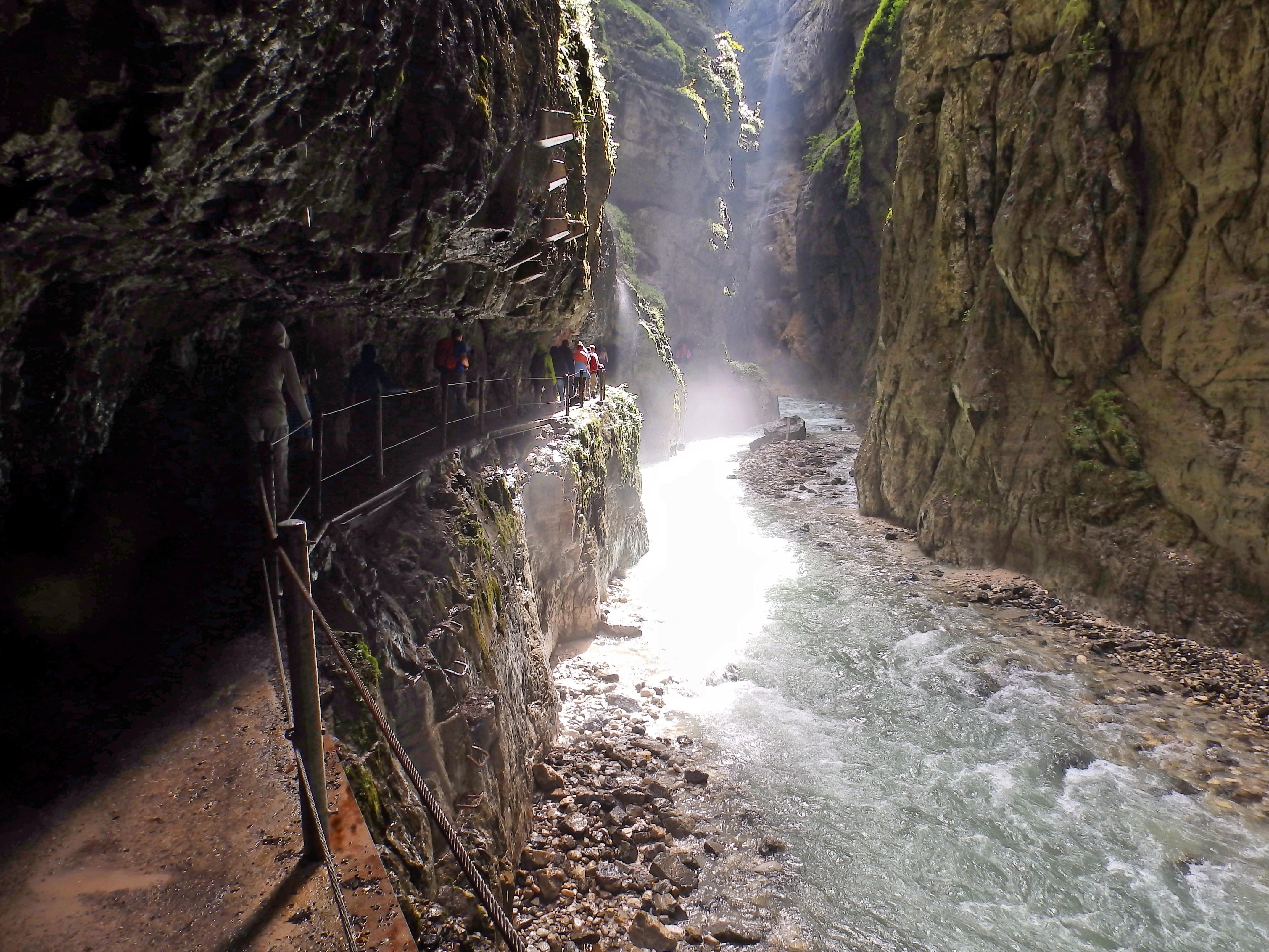 Partnachklamm im Jahr 2014